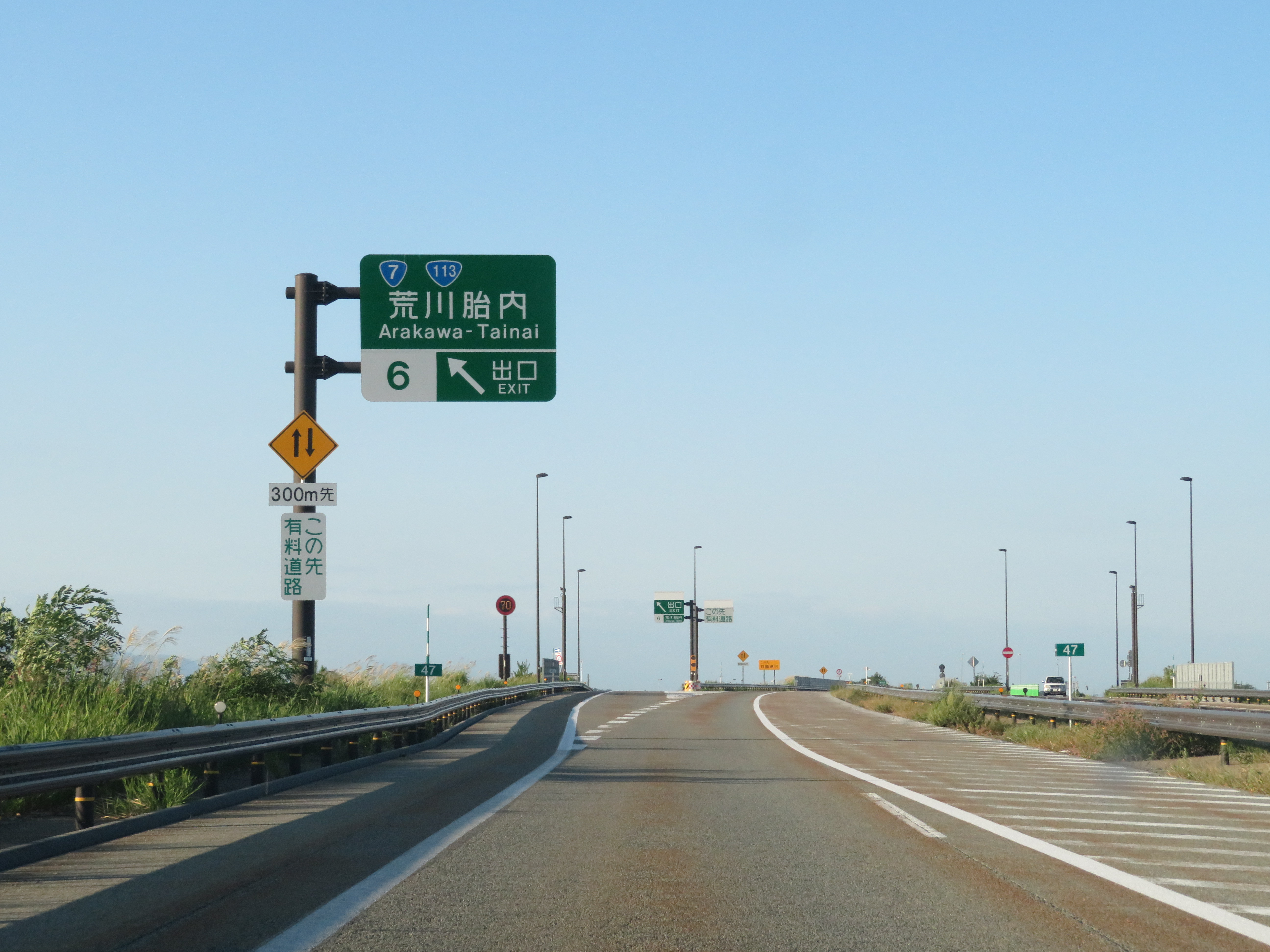 日本海東北自動車道荒川胎内インターチェンジ出口付近（朝日まほろば方面側から撮影）